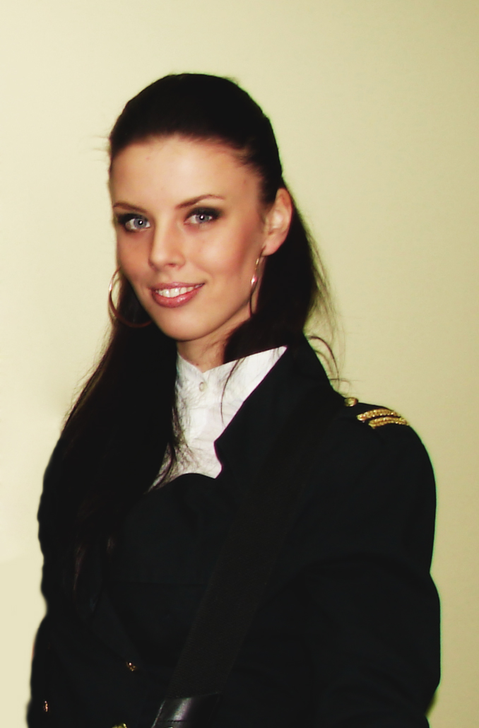 Российская певица и музыкант Анна Щеголева (солистка группы «Лицей»)